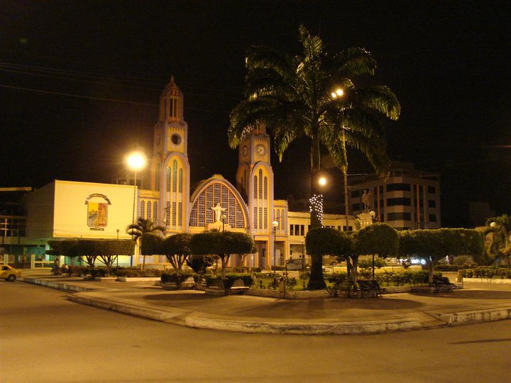 Parque Central del Cantón Pasaje (El Oro - Ecuador)